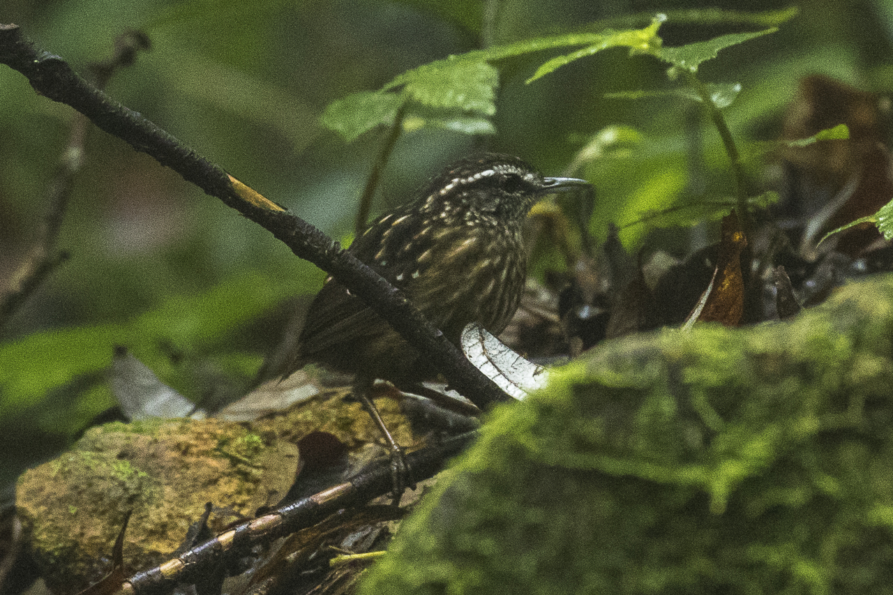 Eye-browed Wren-Babbler - Gunung Gede_MG_4865